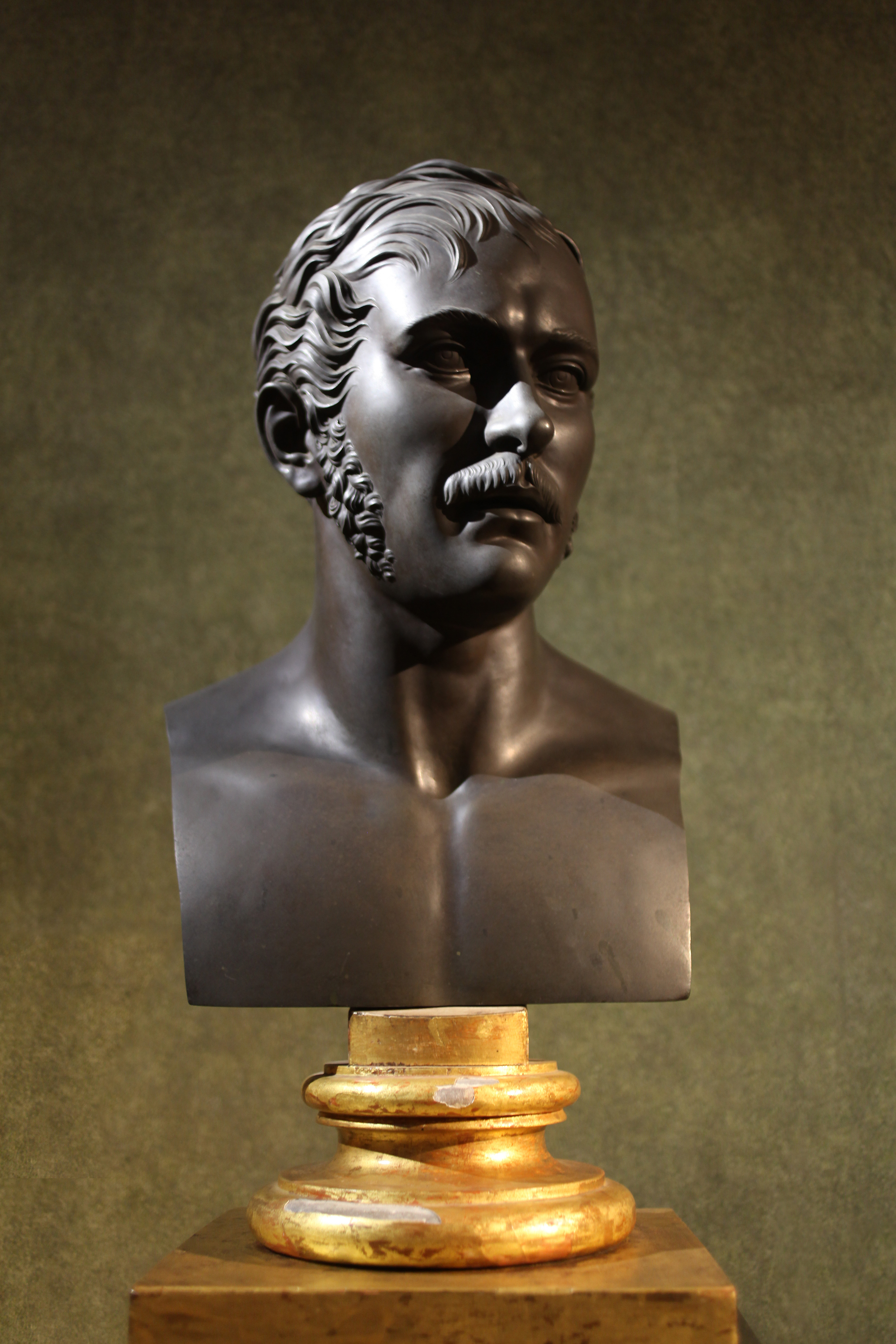 Luigi Manfredini (1771-1840) Busto del viceré Eugenio di Beauharnais (1811); deposito Gabinetto Numismatico di Brera, 1916. Fotografata alla mostra Canova, i volti ideali, Galleria d'Arte Moderna di Milano 2019-2020